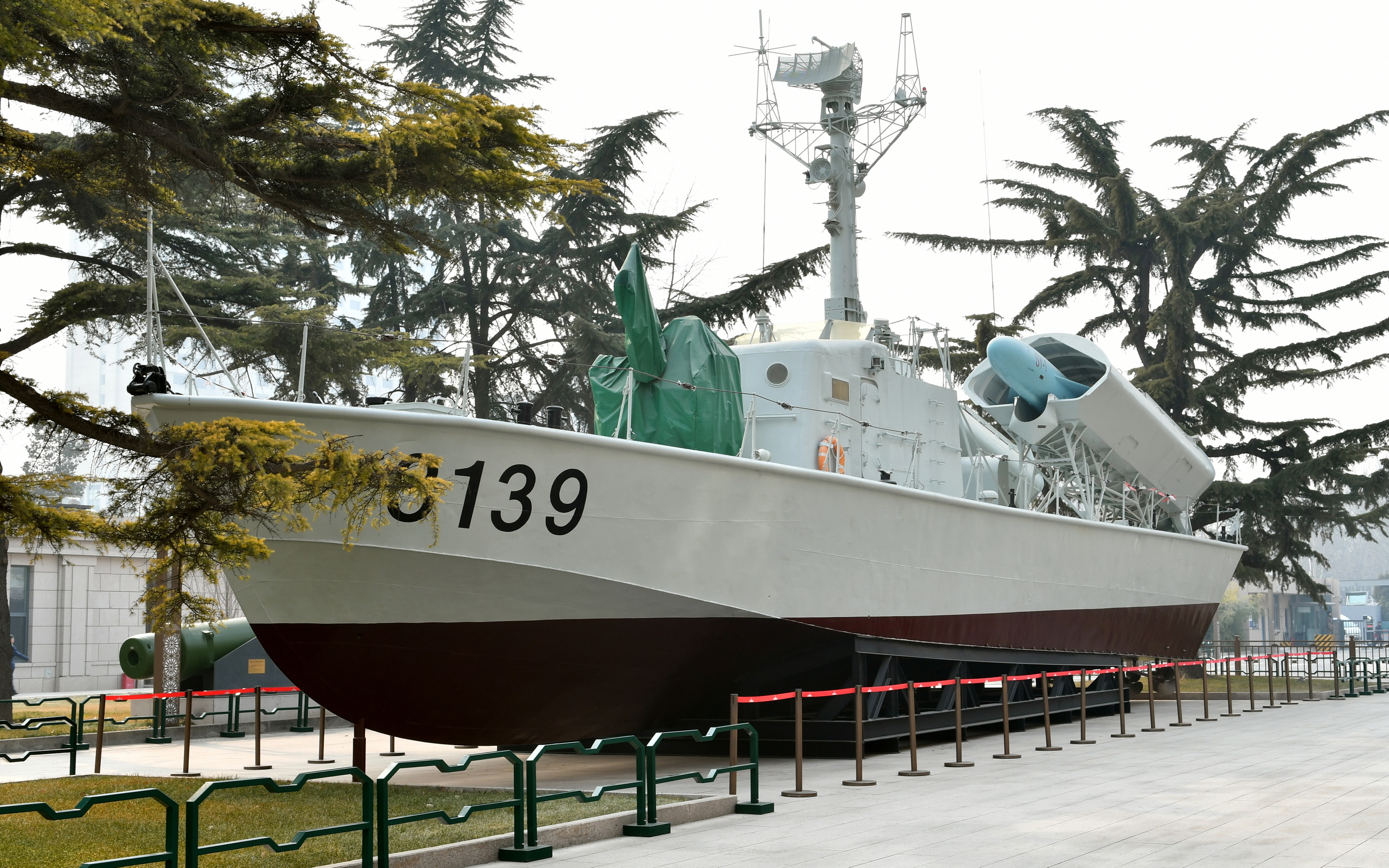 024型导弹快艇（舷号3139），退役后保存在中国人民革命军事博物馆。